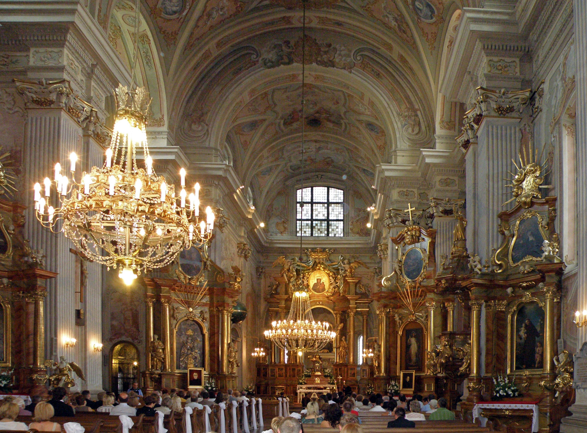 Kościół św. Anny w Warszawie